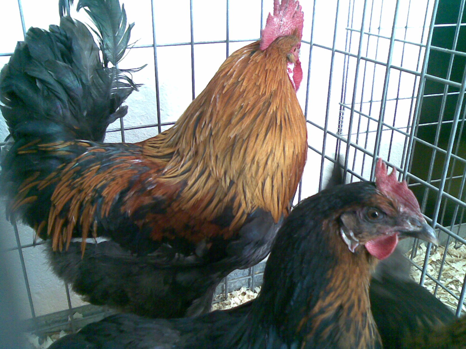 Parella de gallines mallorquines aperdivades a la Fira de Sineu, Mallorca